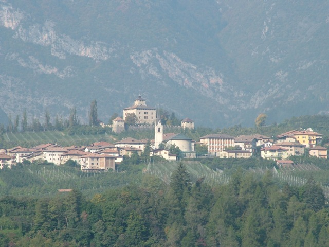 Panorama del paese di Nanno fotografato dalla SS 43 tra Taio e Segno